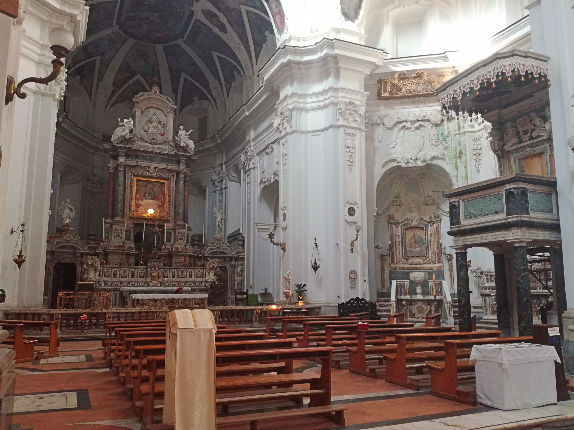 Interno Santa Maria di Costantinopoli, Napoli